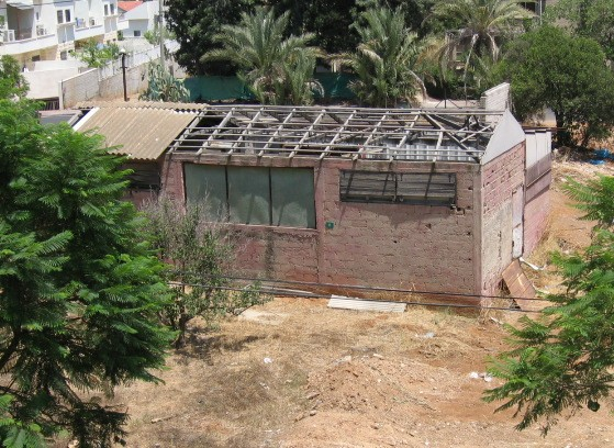 אחד משרידיו של כפר אברהם. צולם על ידי